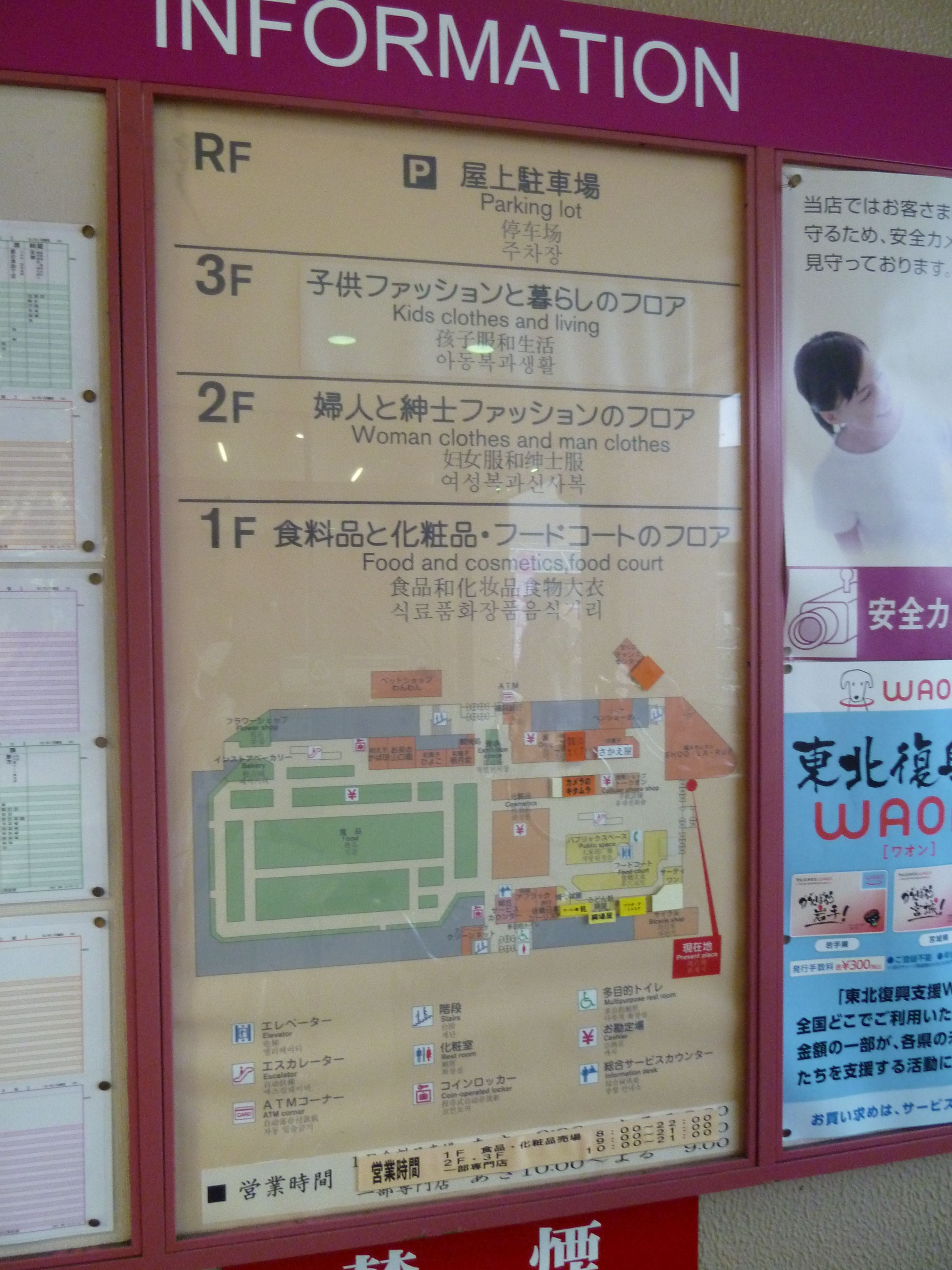 イオン原ショッピングセンターの4か国語案内表示。